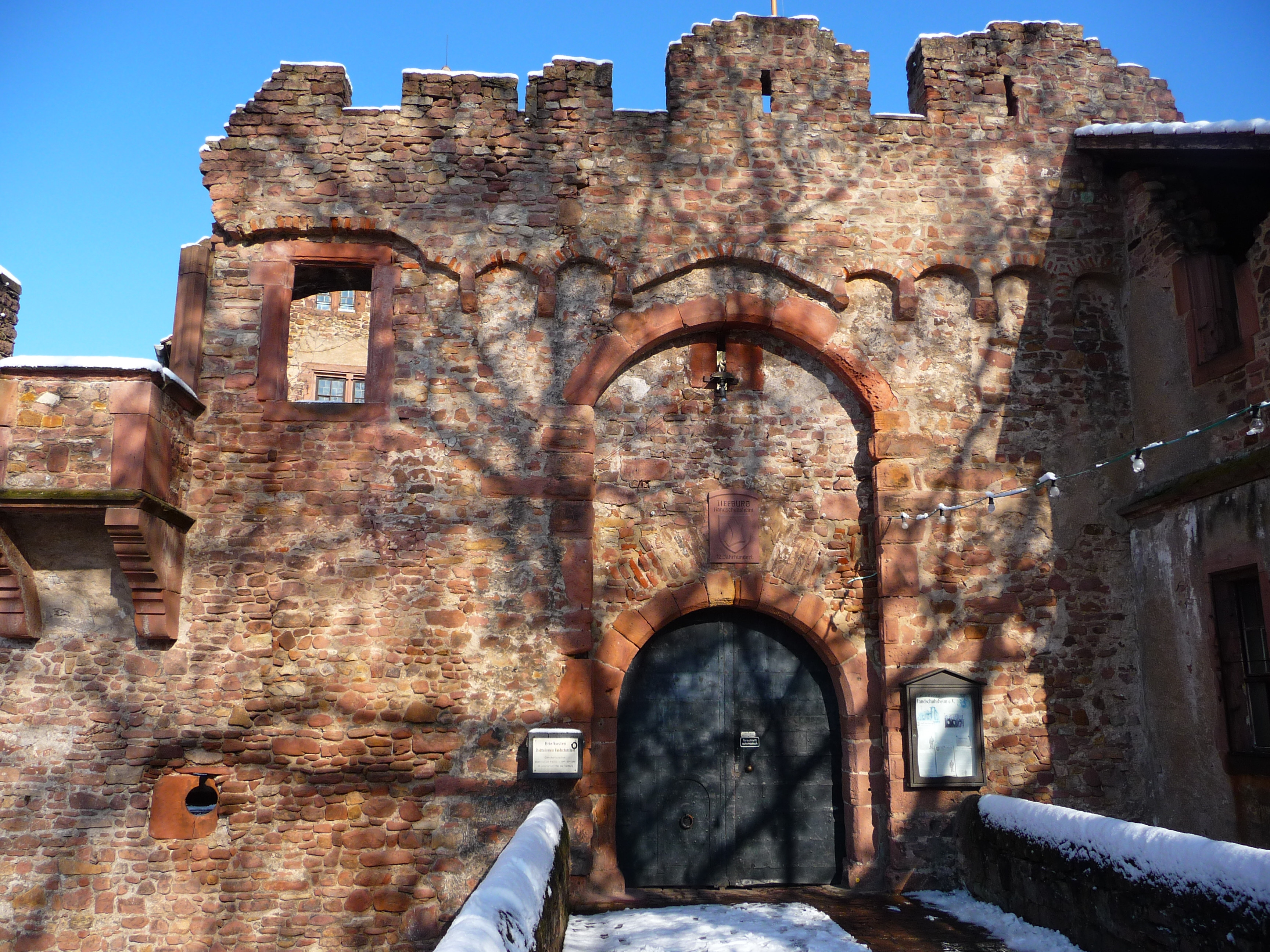 Hauptportal der Tiefburg in Heidelberg-Handschuhsheim (Deutschland)